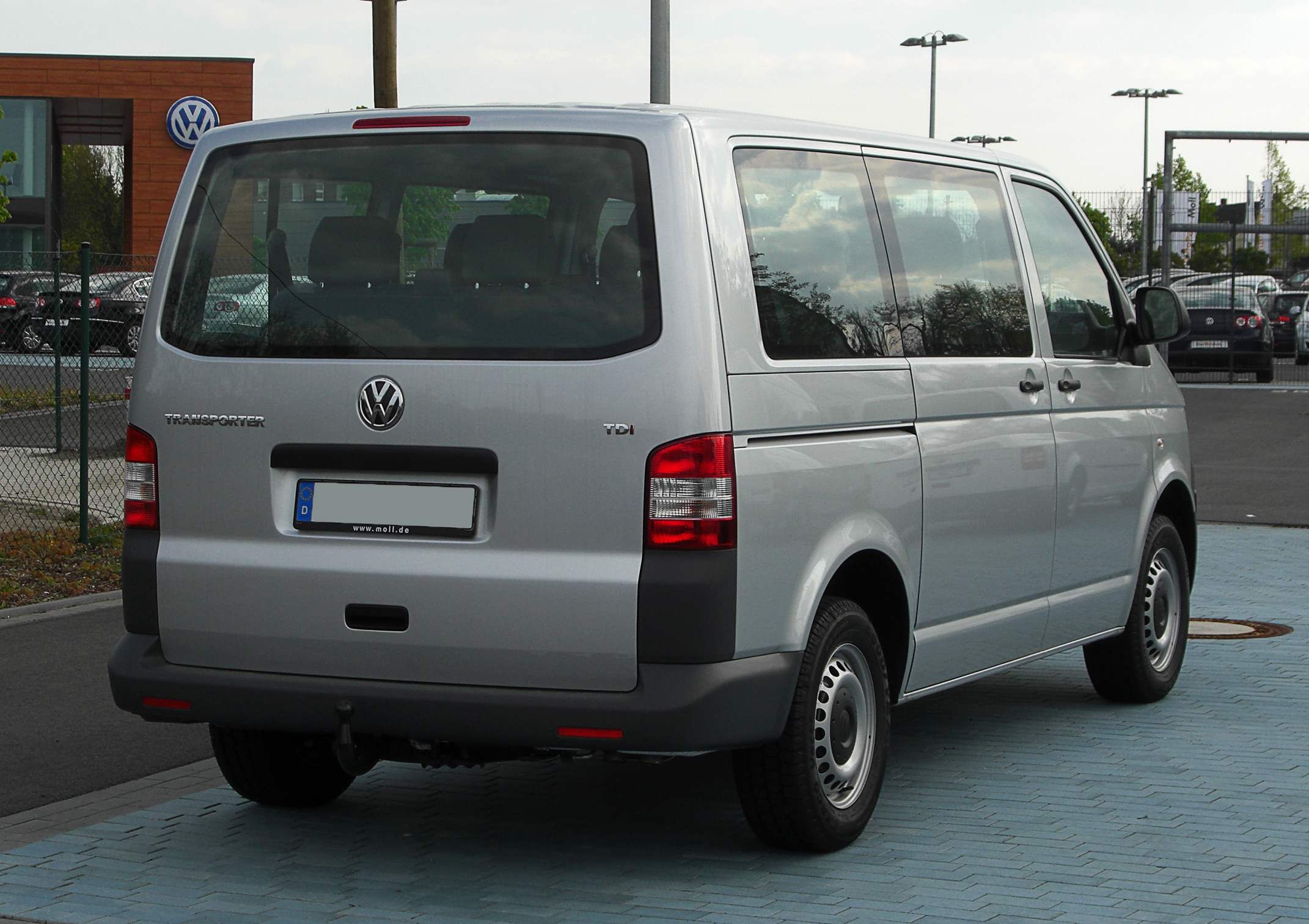 VW Transporter Kombi 2.0 TDI (T5, Facelift)